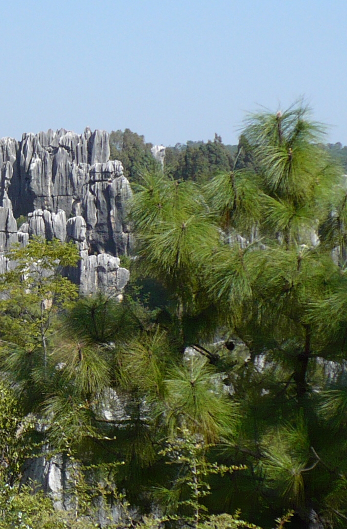 Pinus yunnanensis, Stone Forest, Kunming, Yunnan, China.